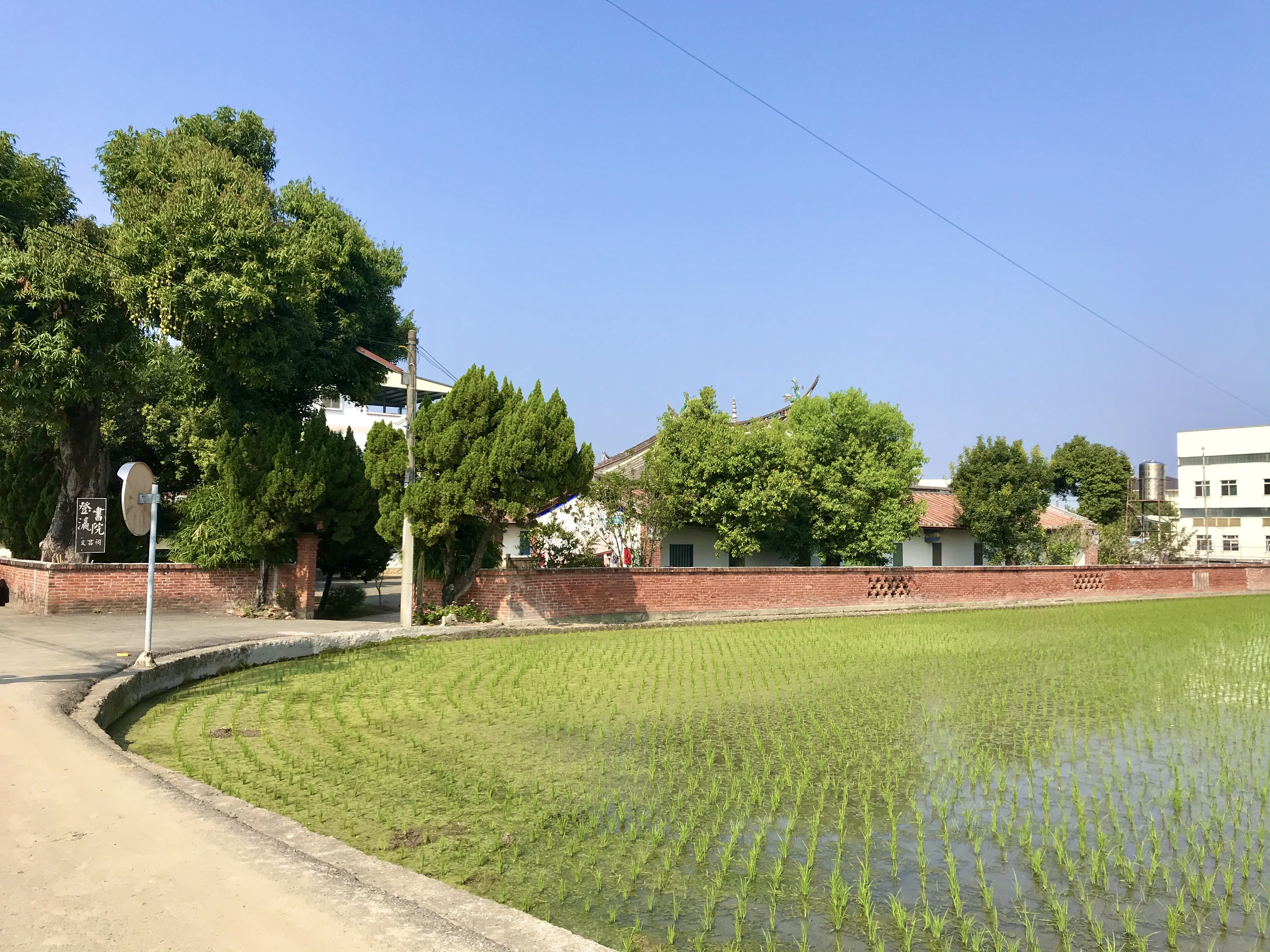 登瀛書院入口